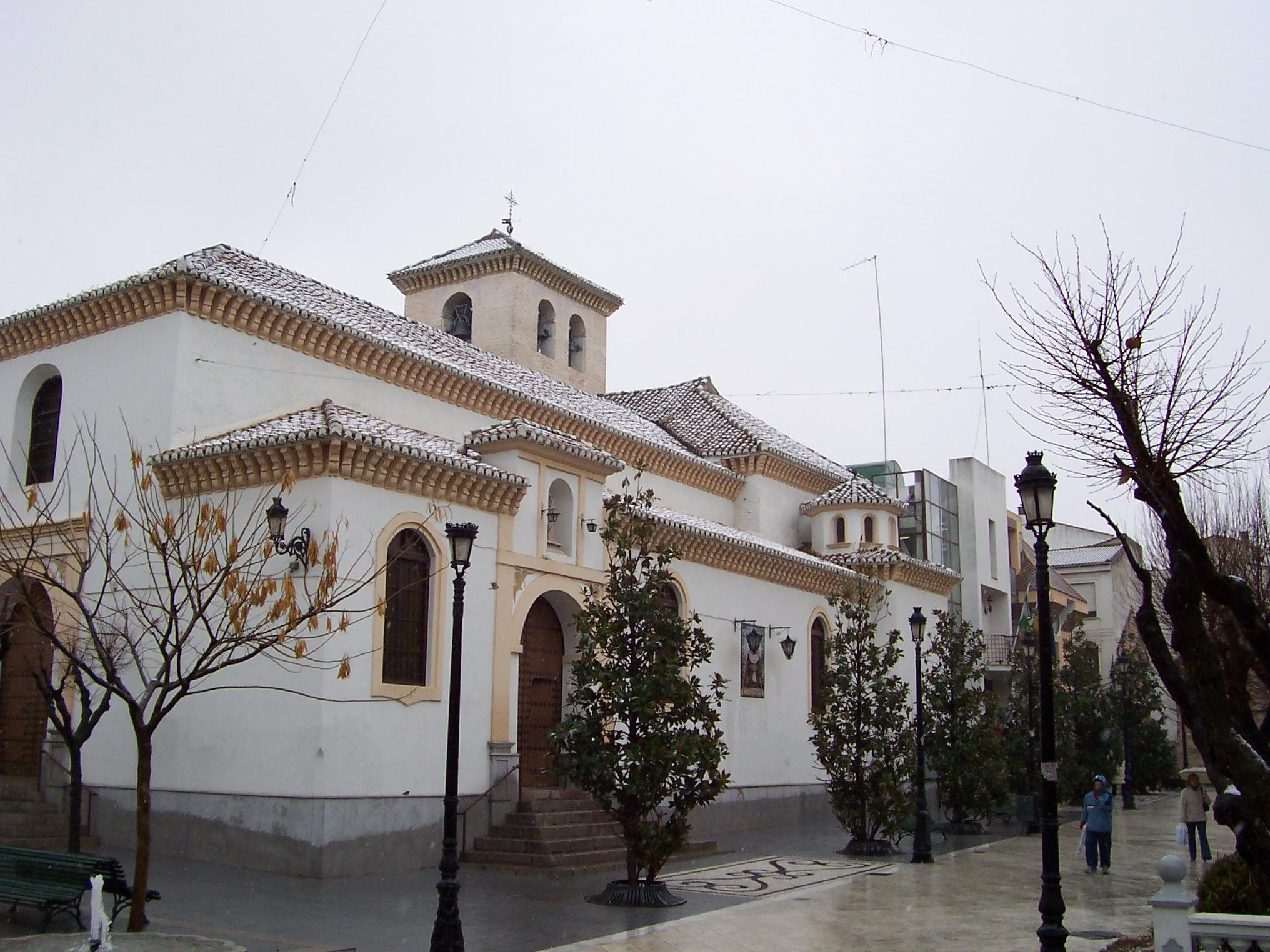 Iglesia de Maracena, en Granada (s. XVI). Fachada princiapla y puerta trasera junto sacristanía. Foto realizada el 26 de febrero de 2006 tras una nevada.